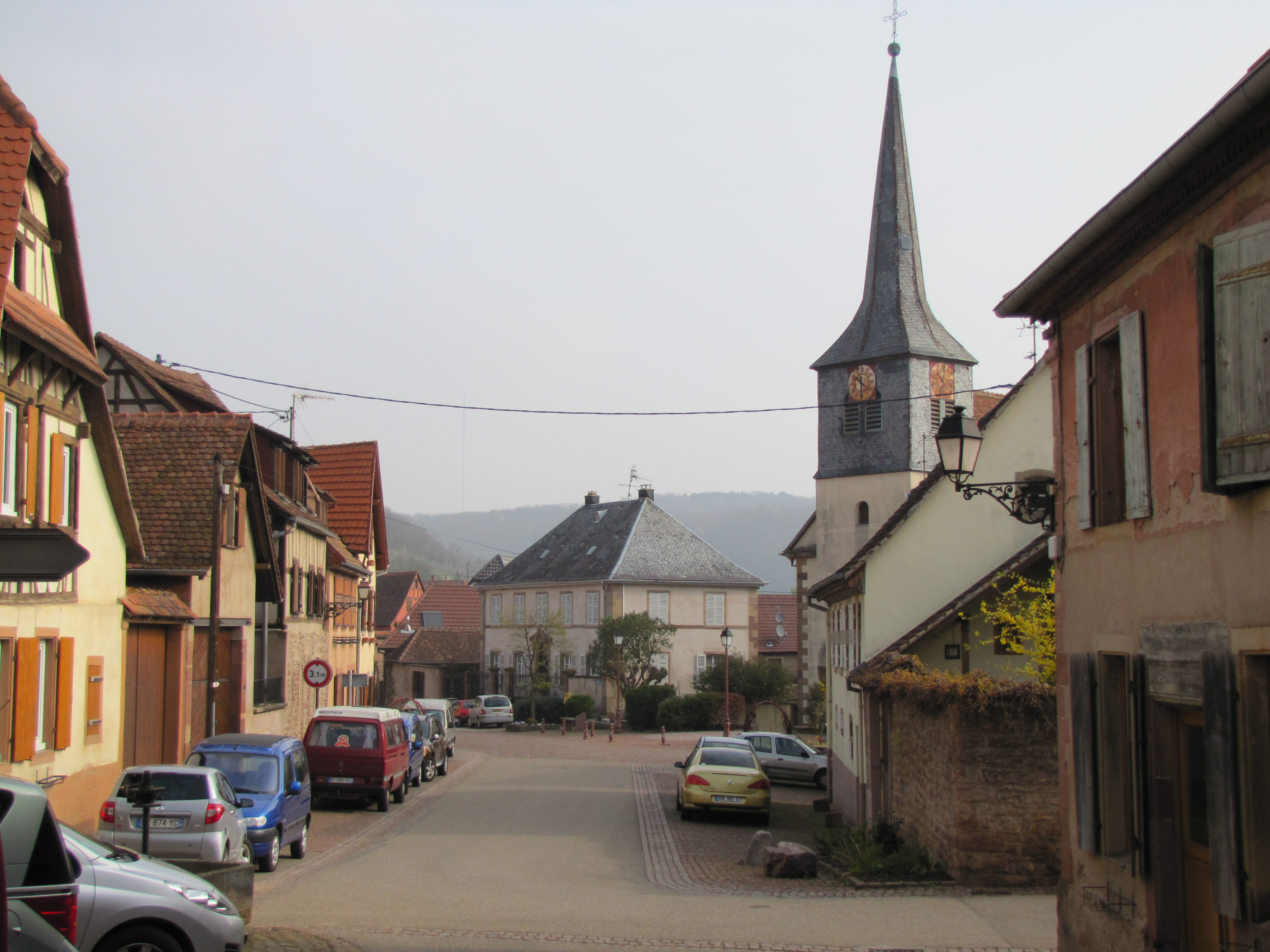 Alsace, Bas-Rhin, Wangen, Rue principale, Église simultanée Saint-Etienne.